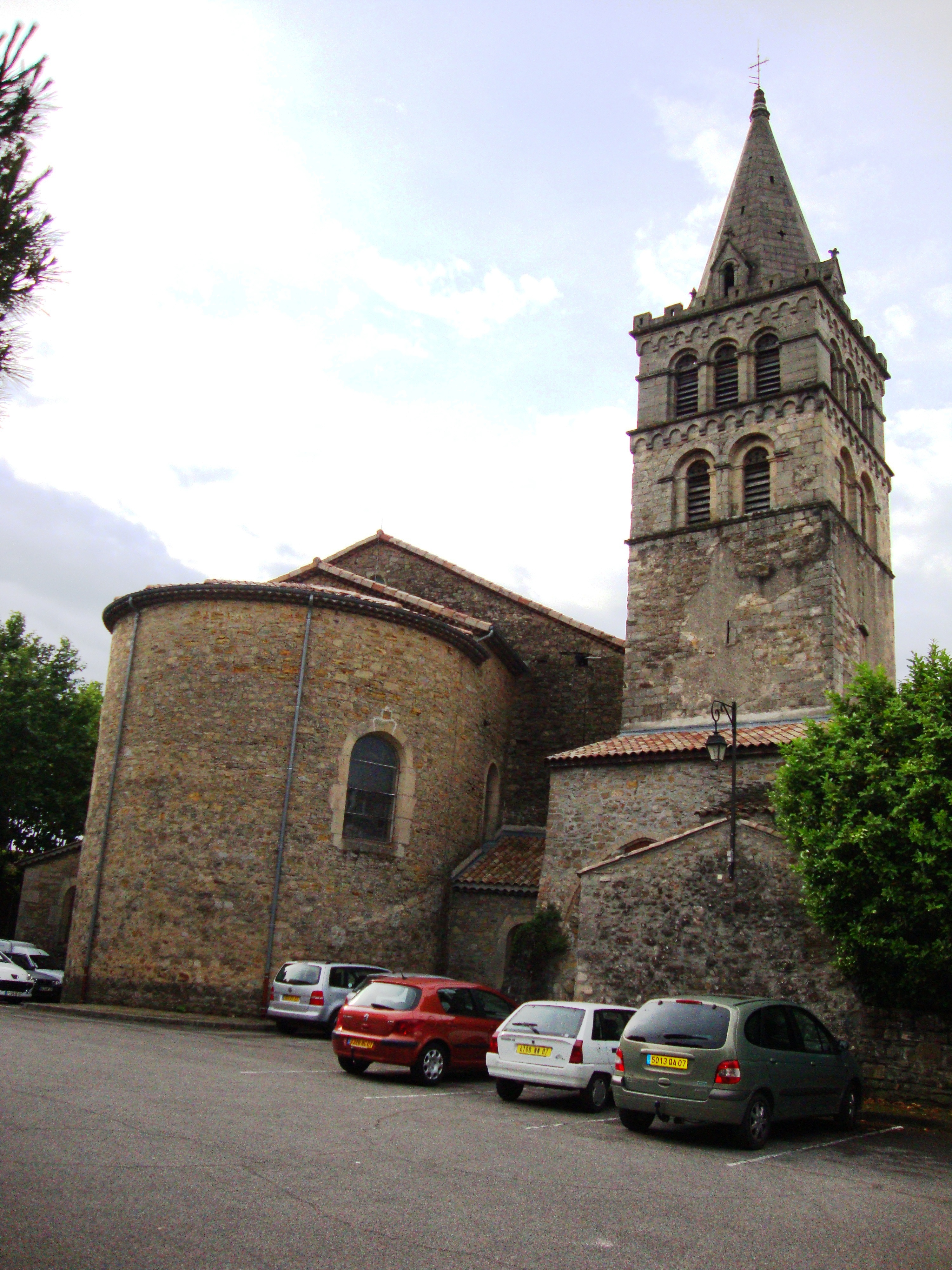 St.Etienne-de-Fontbellon (Ardèche, Fr) église, chevet et tour